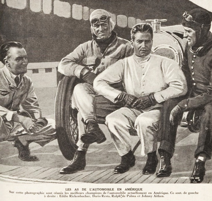 Les As de l'automobile en Amérique en 1917 (La Vie au Grand Air du 15 mars 1917, p.21)